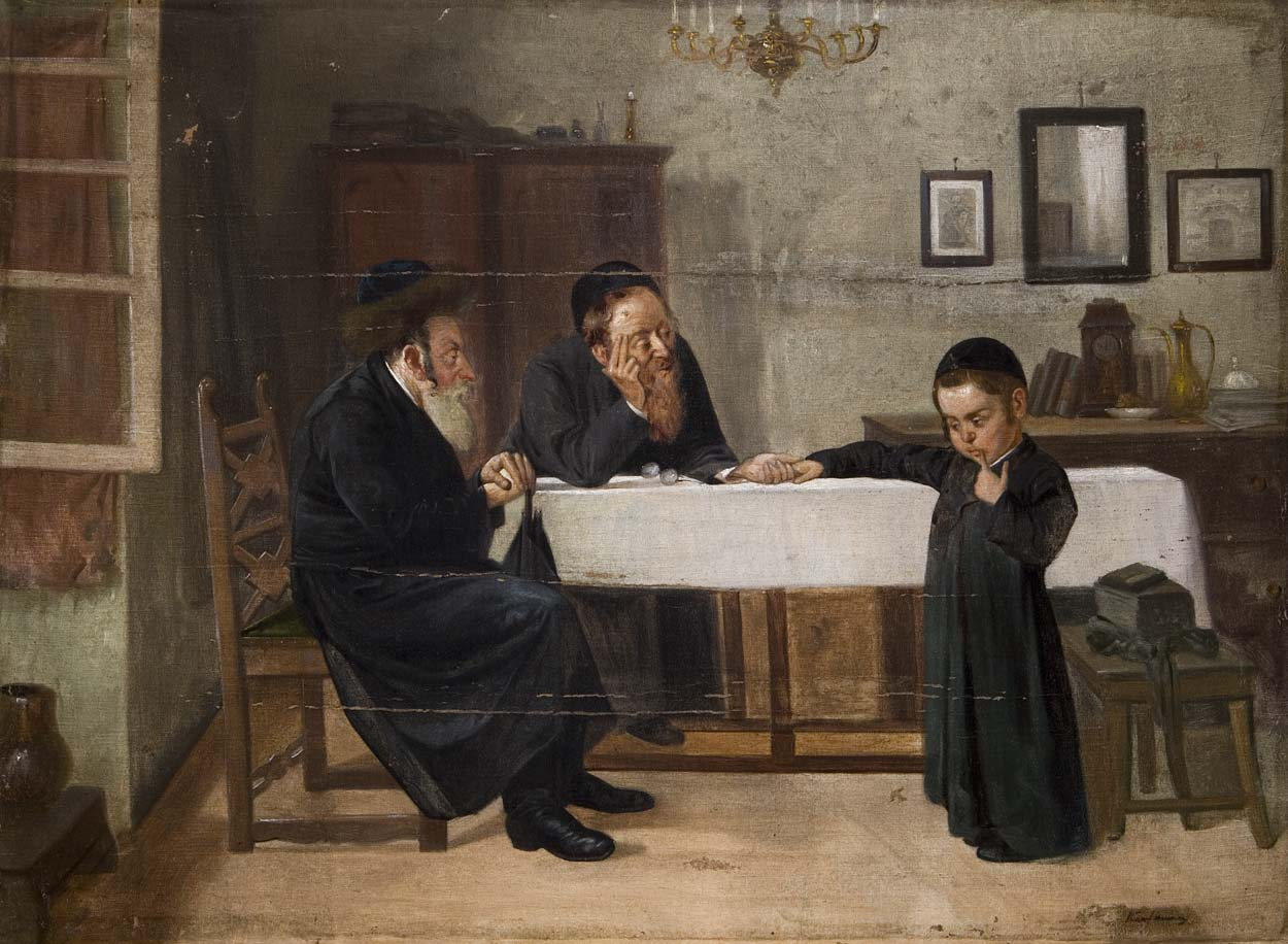 Interieur mit Rabbiner, Vater und Sohn. Öl auf Leinwand, undeutlich signiert, 73.5 x 100.5 cm